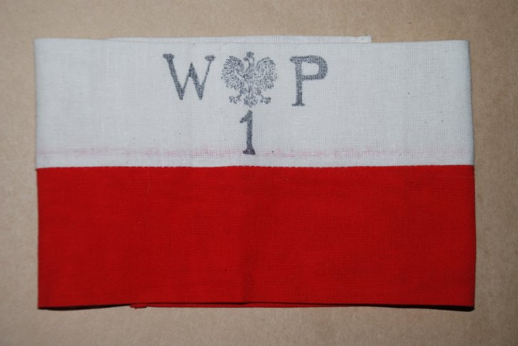 Opaska, którą powstańcy warszawscy nosili na prawym ramieniu (fot Zu)